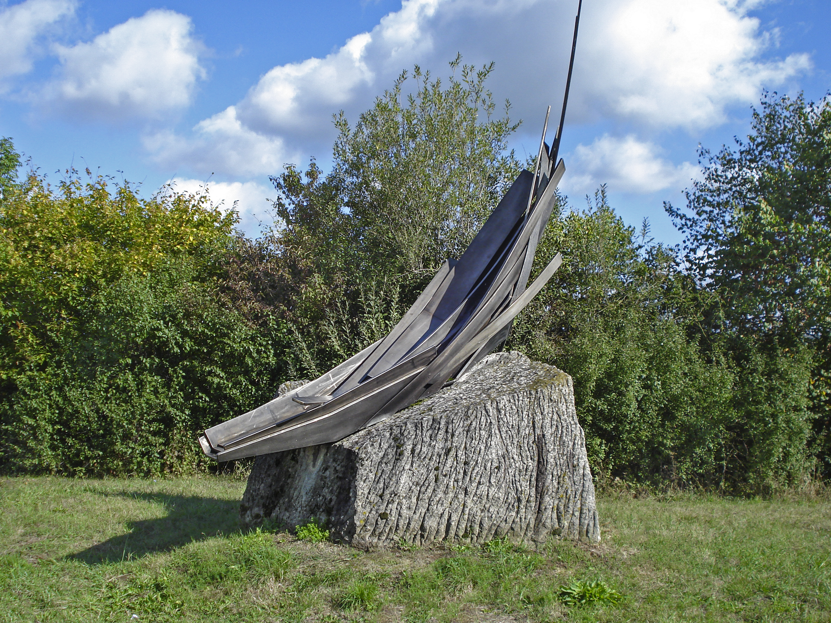 Schelchdenkmal, Mainbrücke bei Knetzgau Monument of a "Schelch" (small boat), unknown artist, near Knetzgau, Germany